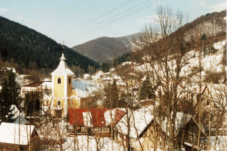 Modlatín